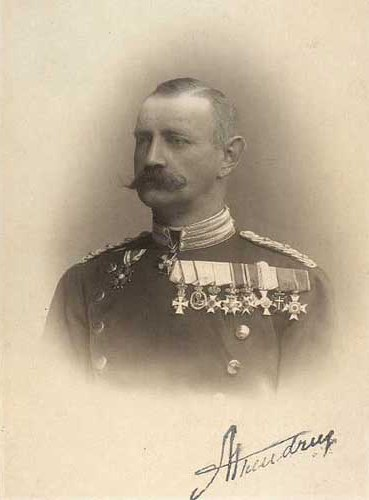 Albert Arendrup (1852-1931), Danish general